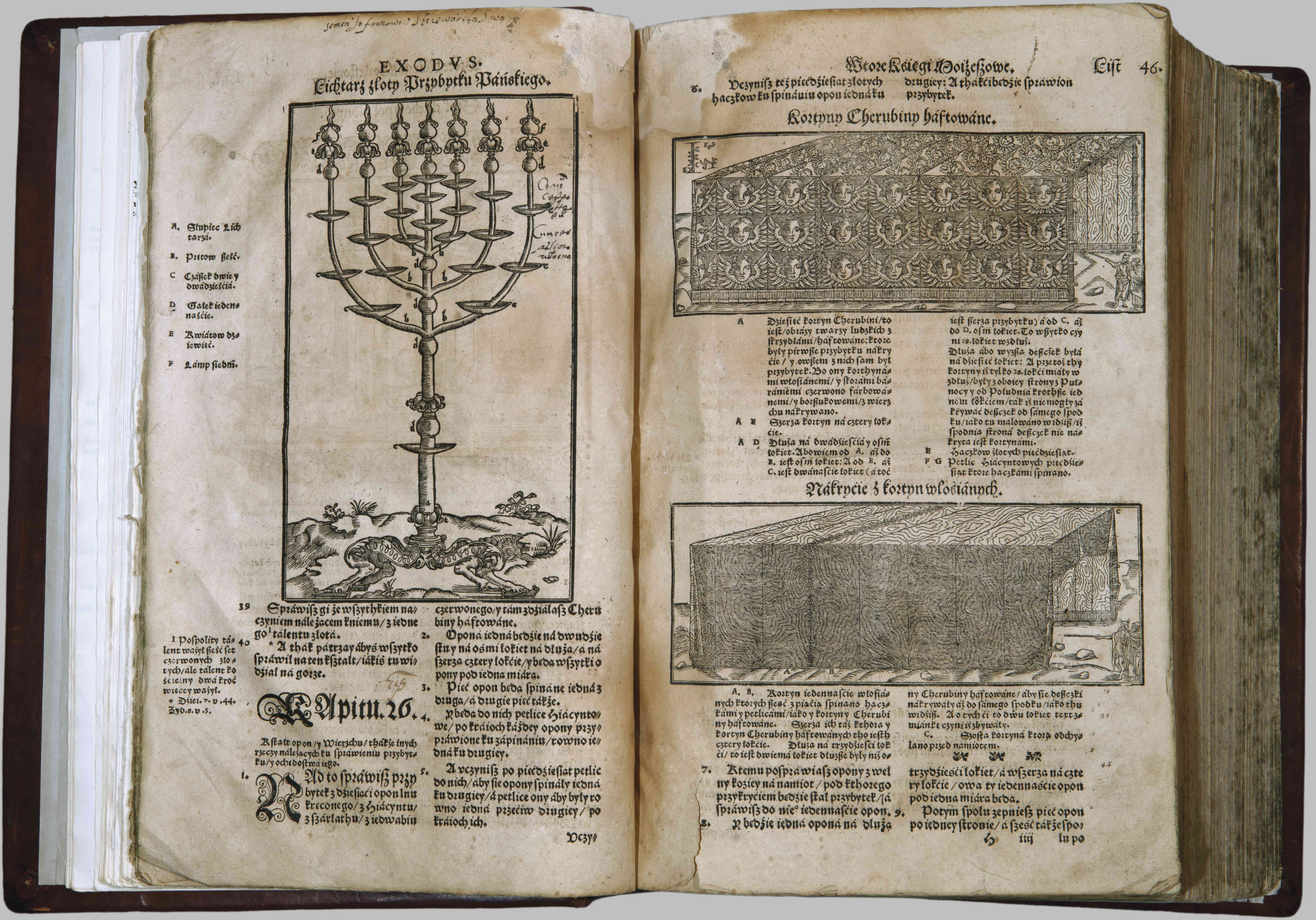 Брэсцкая Біблія 1563 г. Цэнтральная навуковая бібліятэка імя Якуба Коласа Нацыянальнай акадэміі навук Беларусі